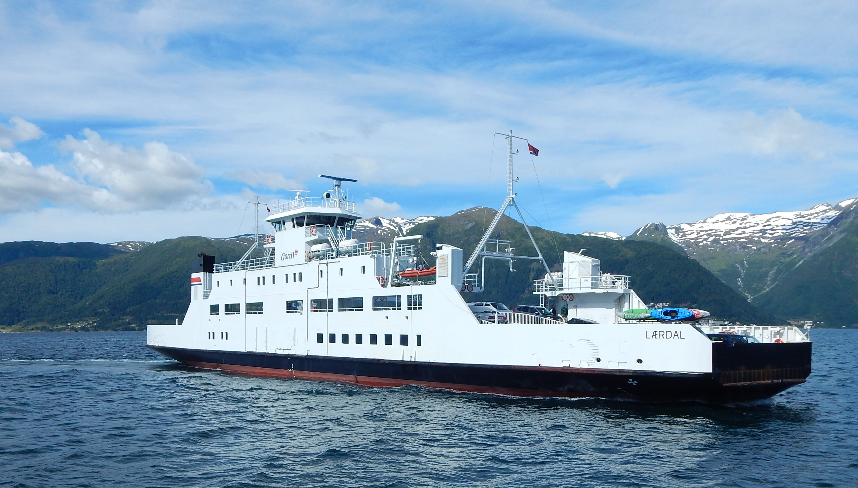 MF Lærdal ved Hella fergekai